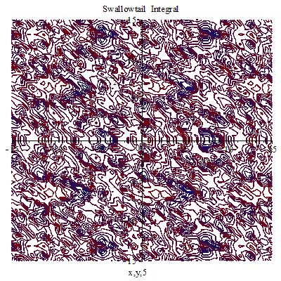 Emiliàn e rumagnòl: Swallowtail Integral Maple contour plot